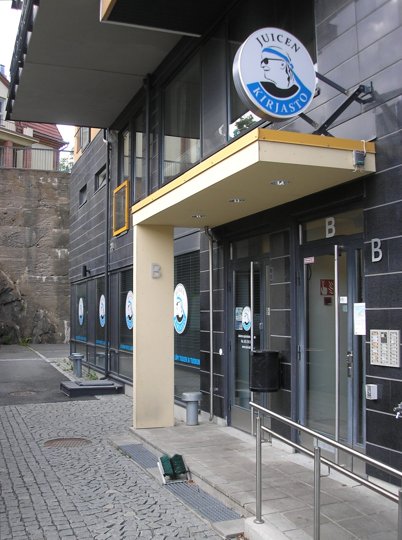 Juicen kirjaston sisäänkäynti Pellavantorin laidalla Tampellassa, Tampereella